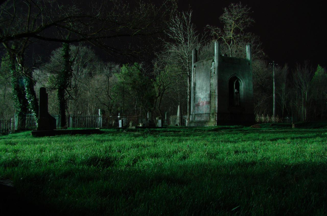 Старо-русское (1 гражданское) кладбище, город Симферополь